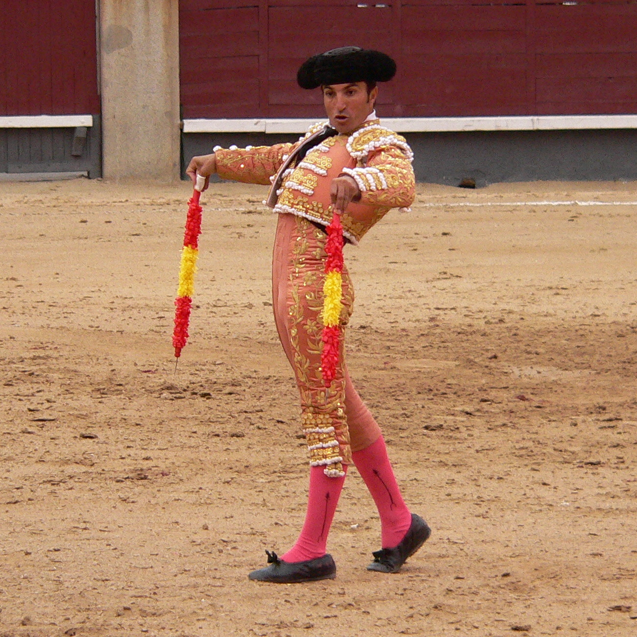 Description: Banderillero (Jose Pedro Prados El Fundi) Place : Plaza de Toros Las Ventas City : Madrid Country : Spain Photographer: © Manuel González Olaechea y Franco Shot date : October, 9th , 2005